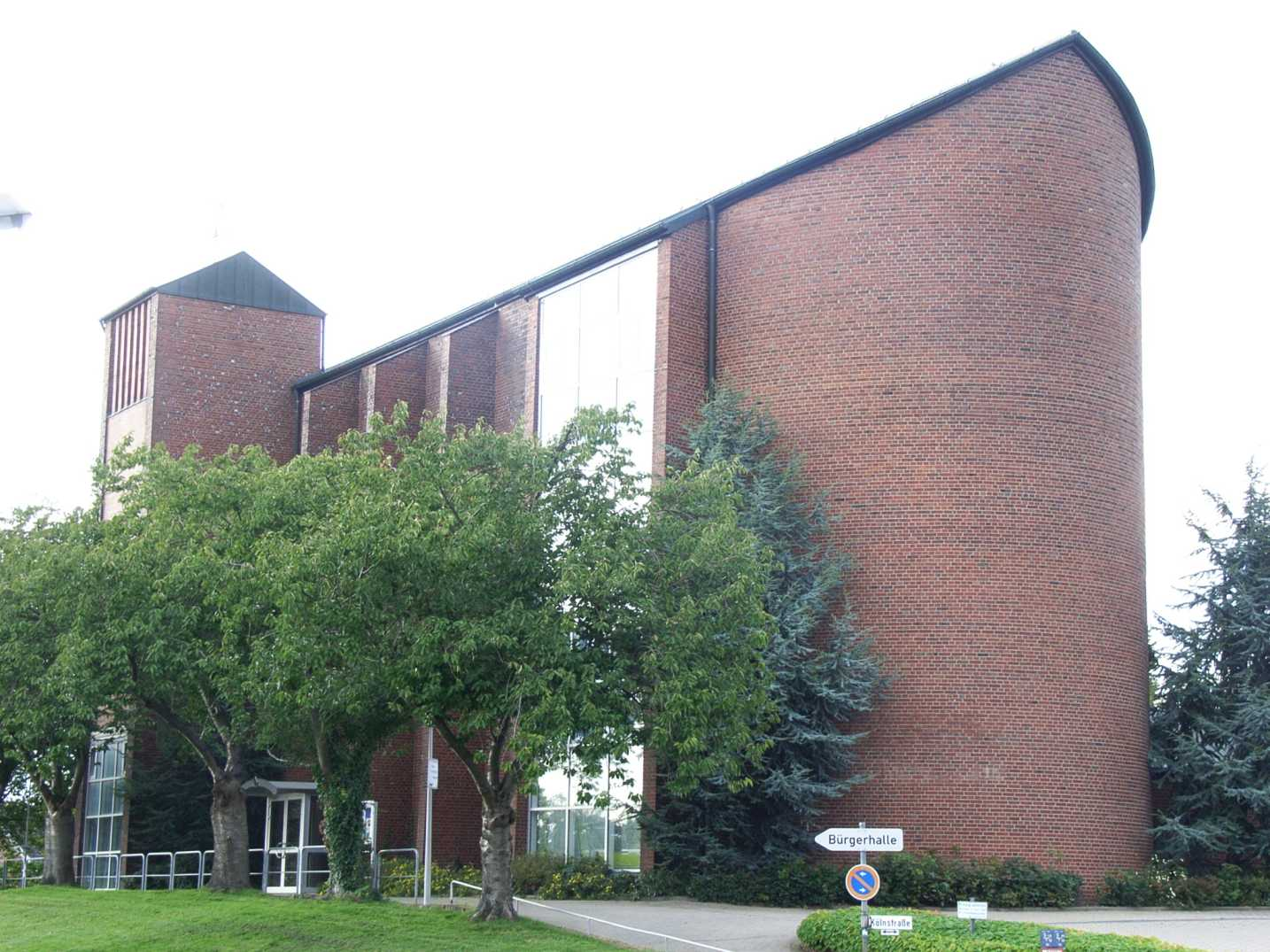 St. Gereon, kath.Kirche Gereonsweiler, NRW